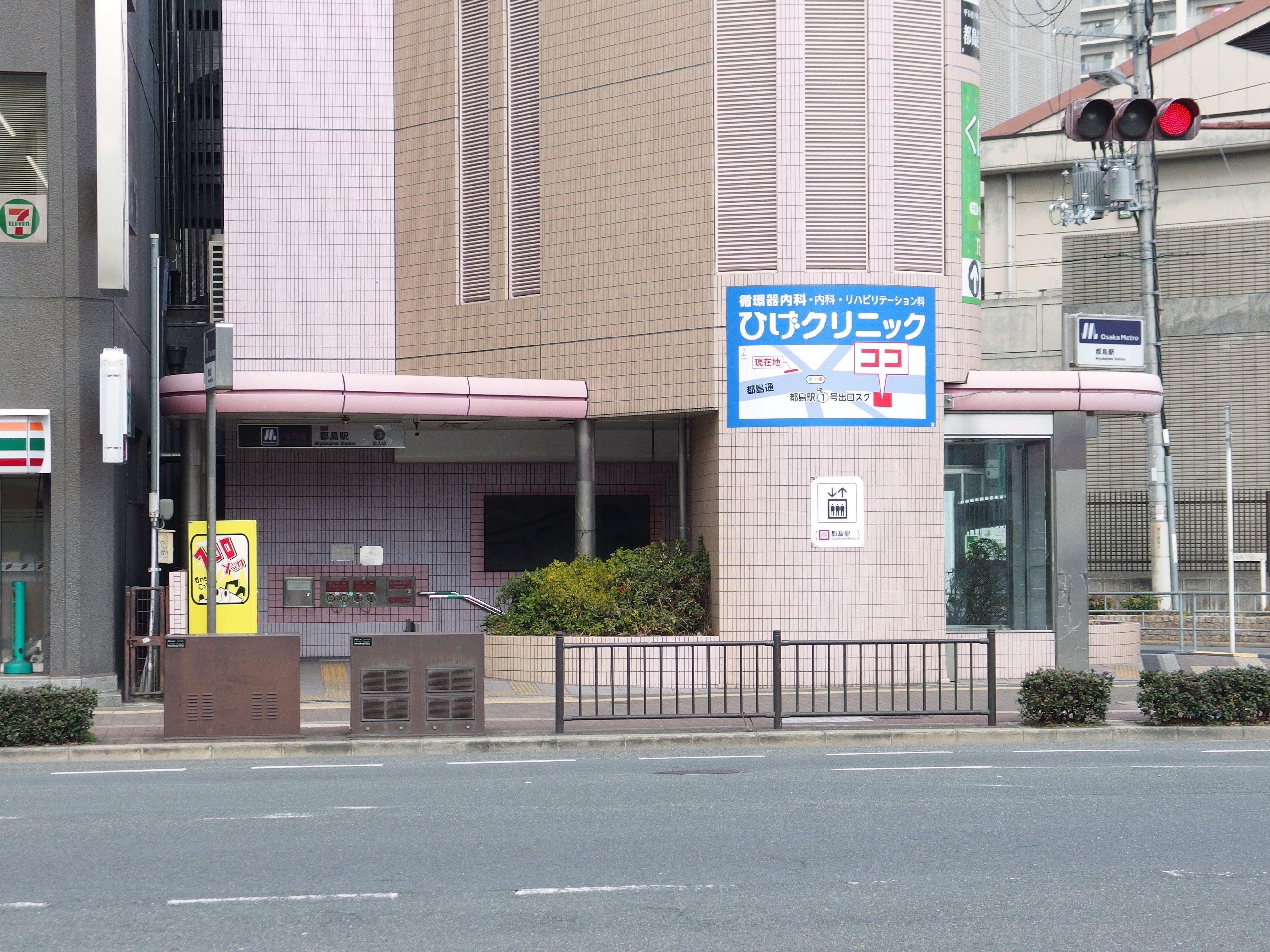 大阪府大阪市にある都島駅の3号出入口。Osaka Metro谷町線が乗り入れている。